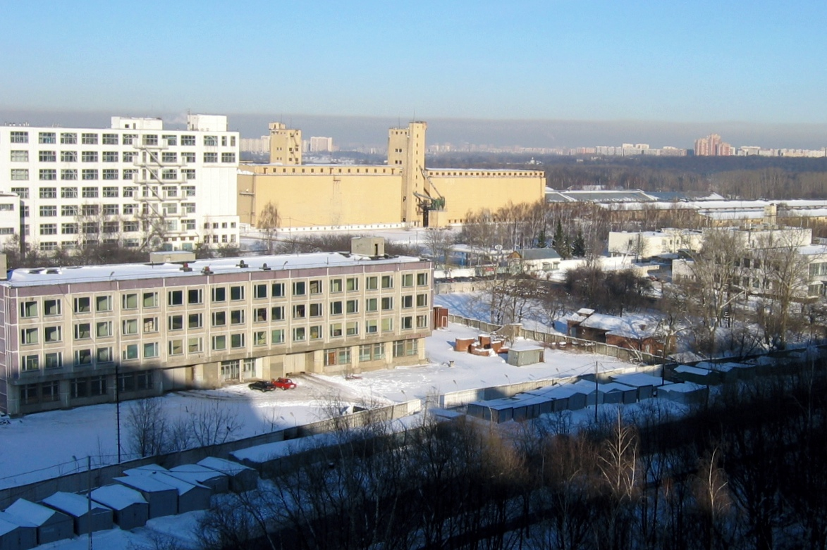 Вид на промышленную зону № 28 «Ленино» в районе Бирюлёво Восточное, до начала застройки её территории новым микрорайоном «Царицыно», 2005 год.